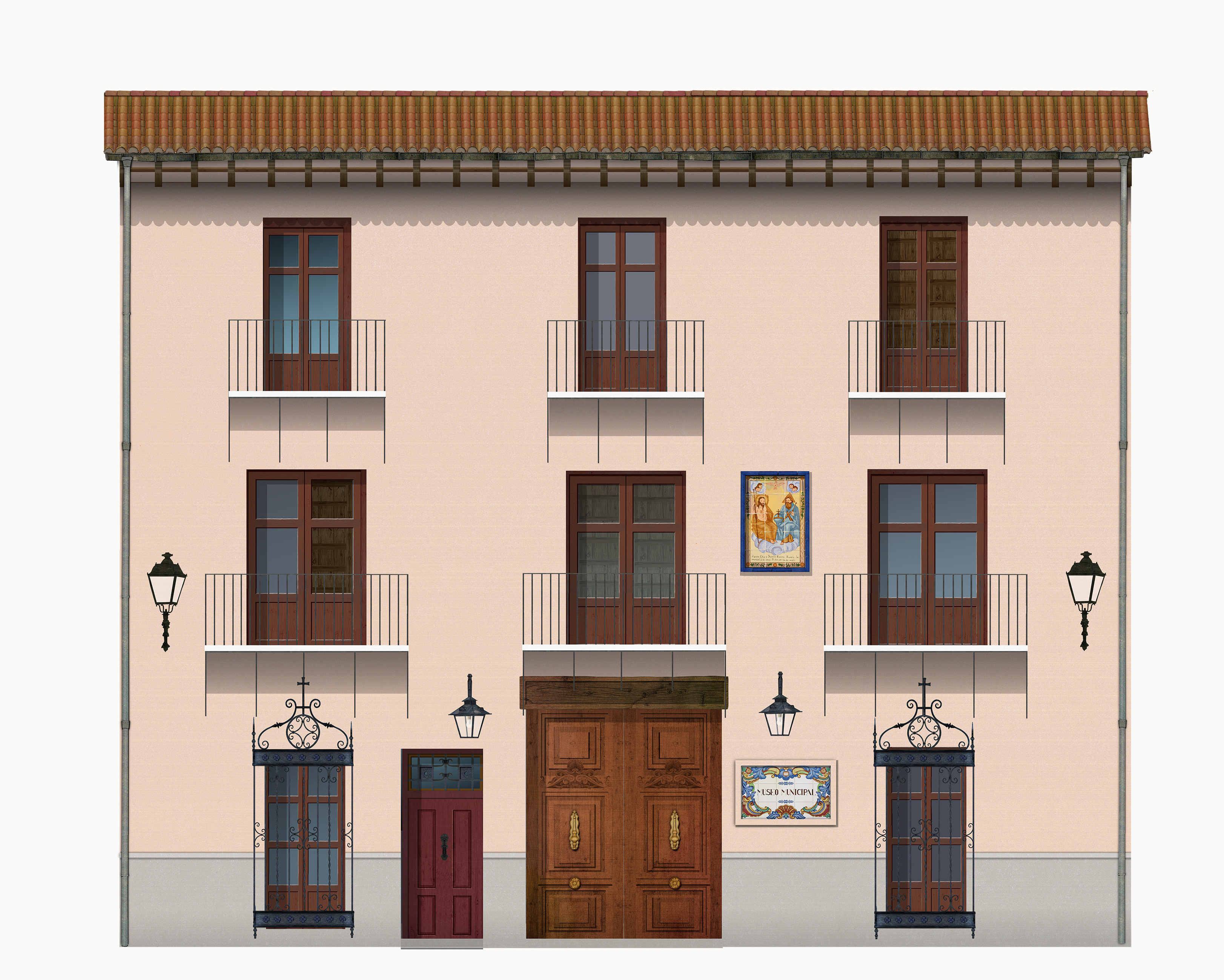 Museu etnològic de Manises